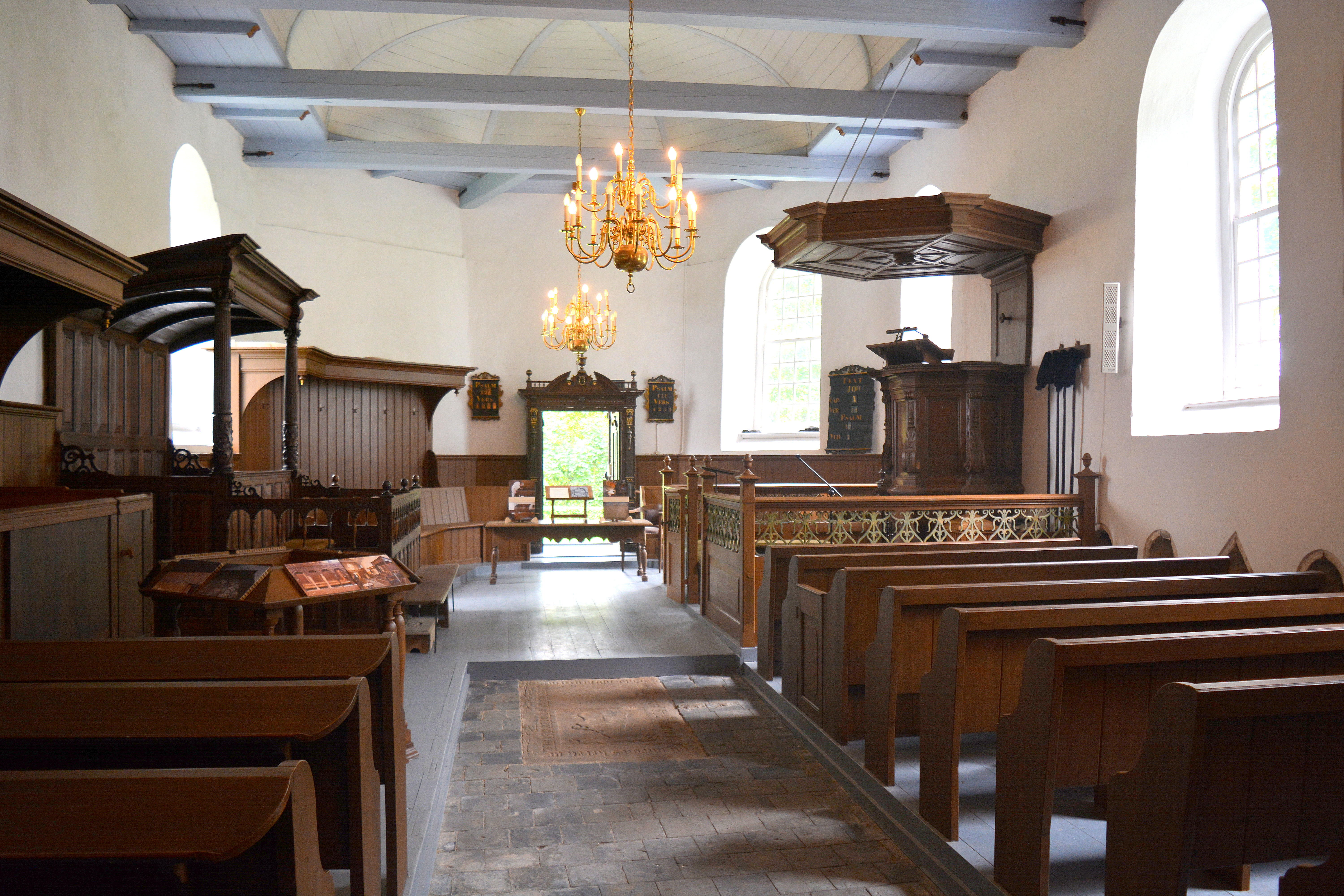 Kerk van Westernijkerk, interieur